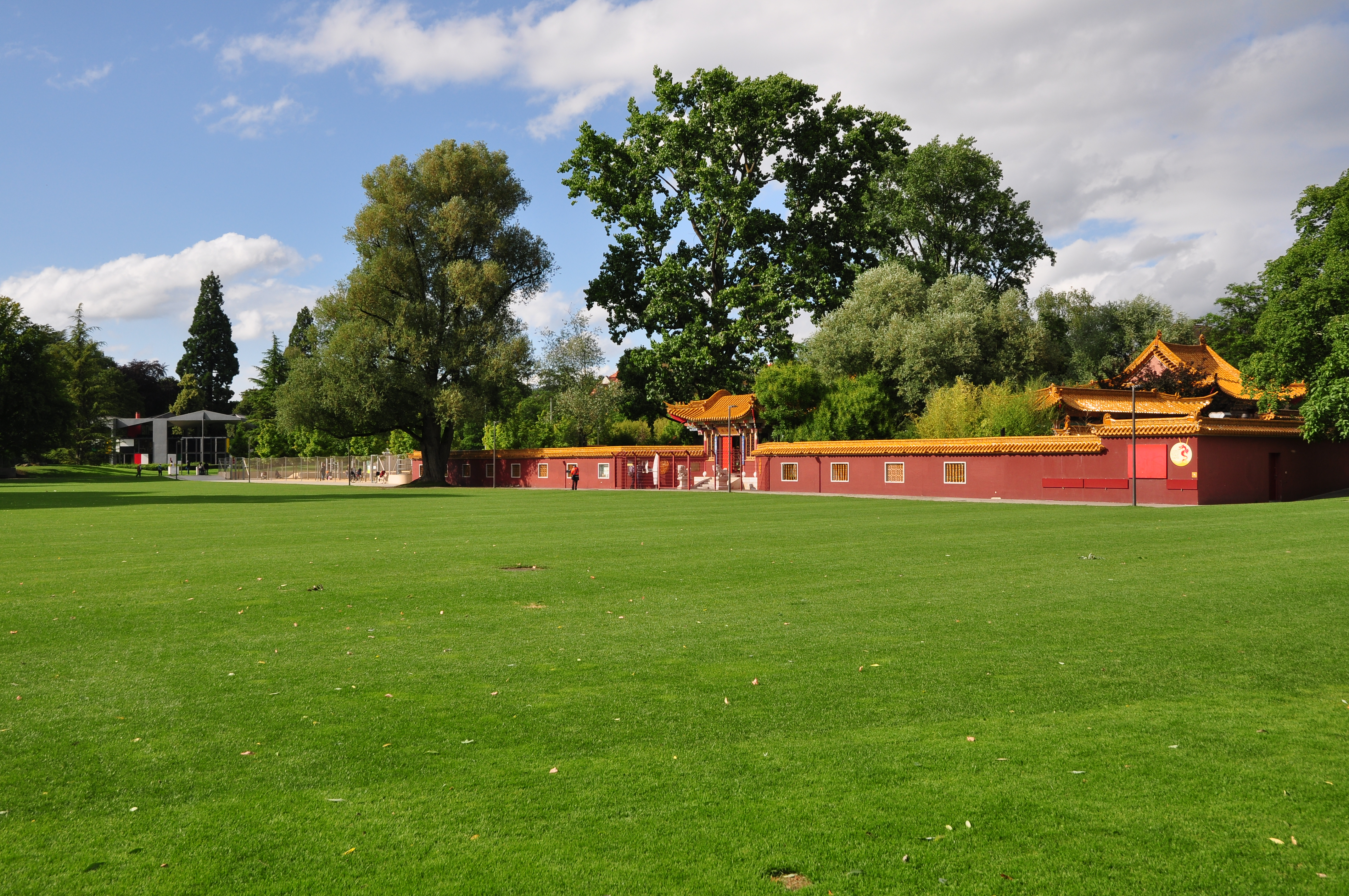 Blatterwiese in Zürich-Seefeld (Switzerland), as seen from Kugelbrunnen fountain at Zürichhorn, Centre Le Corbusier and Chinese garden in the background.